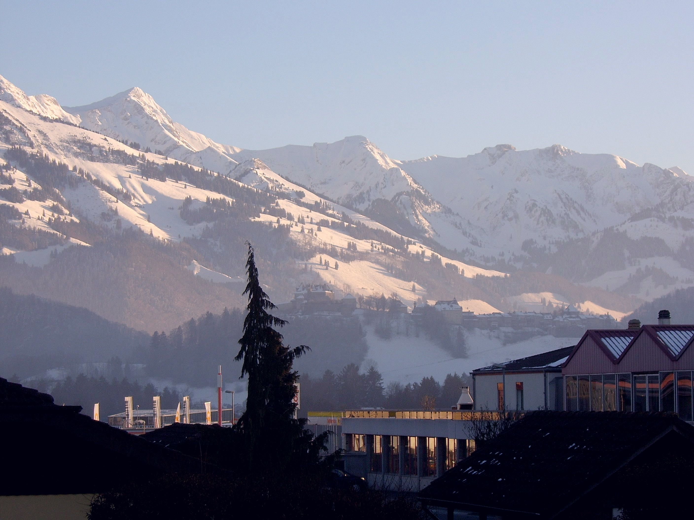 panorama Gruyeres